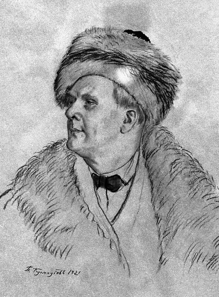 Фотокопия этюда к портрету Ф. И. Шаляпина.